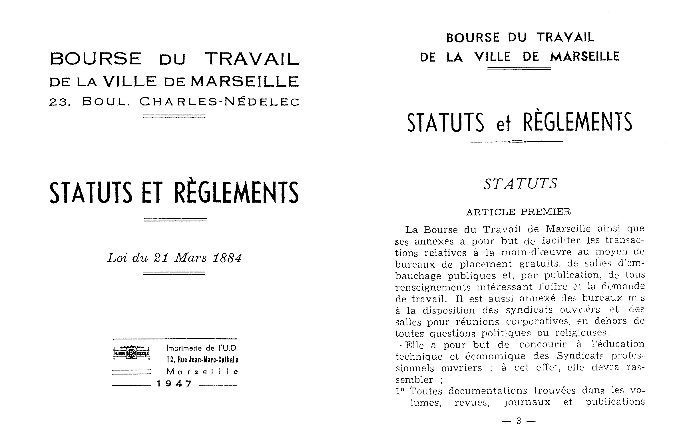 Copie des deux premières pages de ce document paru en 1947.